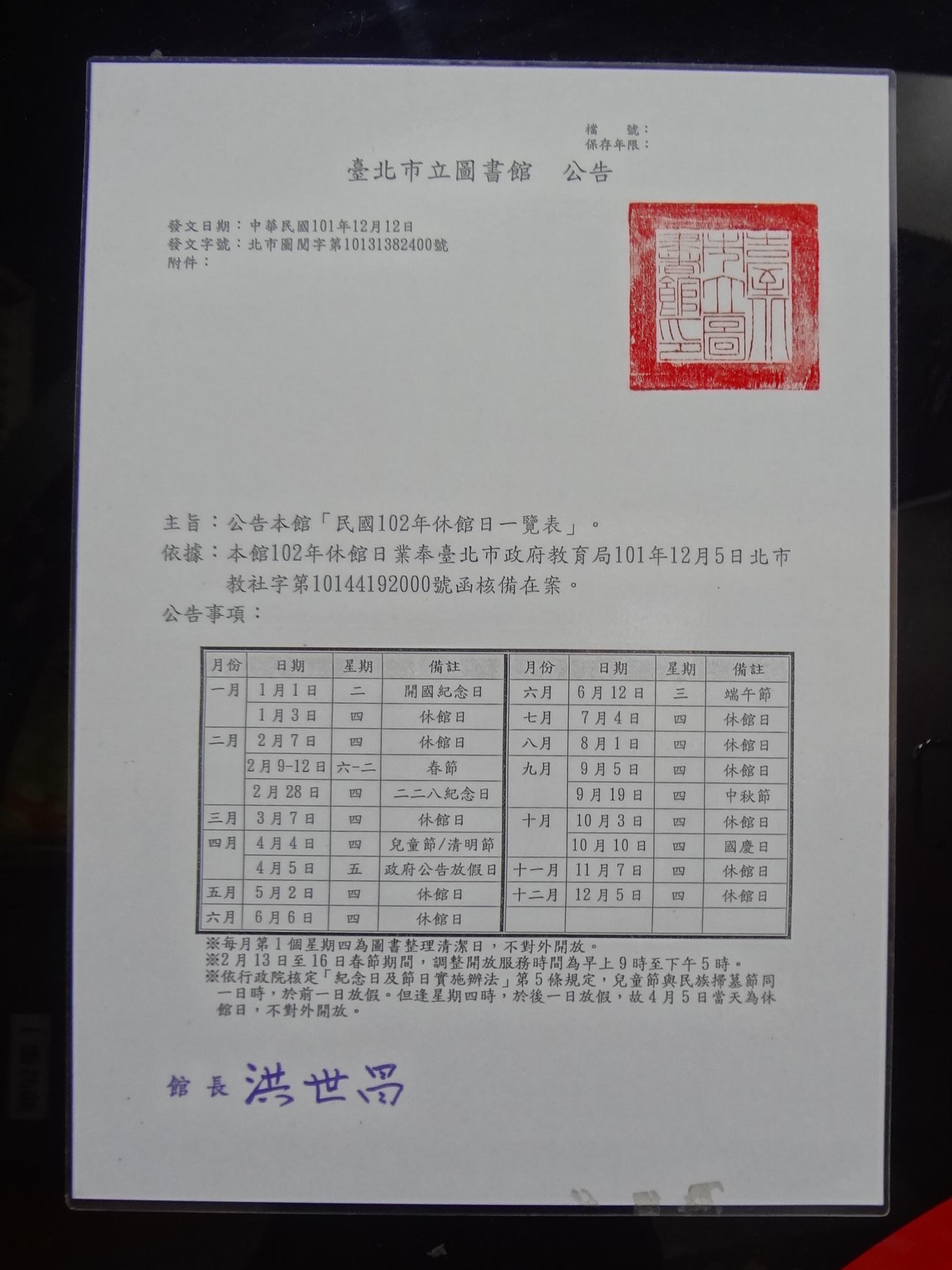 中文（台灣）: 2012年12月12日，臺北市立圖書館公告中華民國102年休館日一覽表。拍攝於臺北市立圖書館中崙分館大門對面電梯牆面。